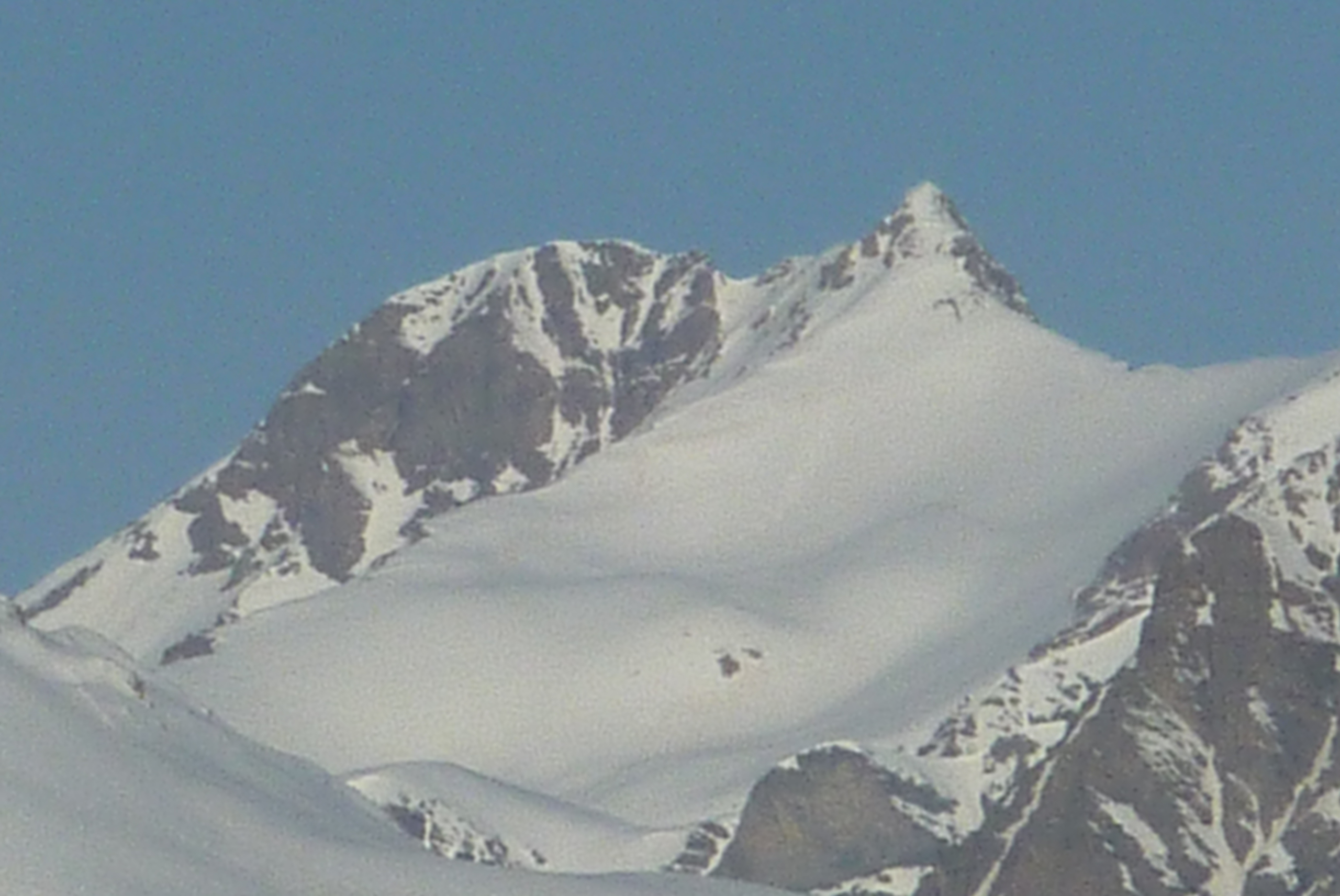 Mpnt-Pelat 3052m. Photo prise par André Payan-Passeron au téléobjectif de Valberg (La Dreccia) située à 30 km à vol d'oiseau au sud-est.